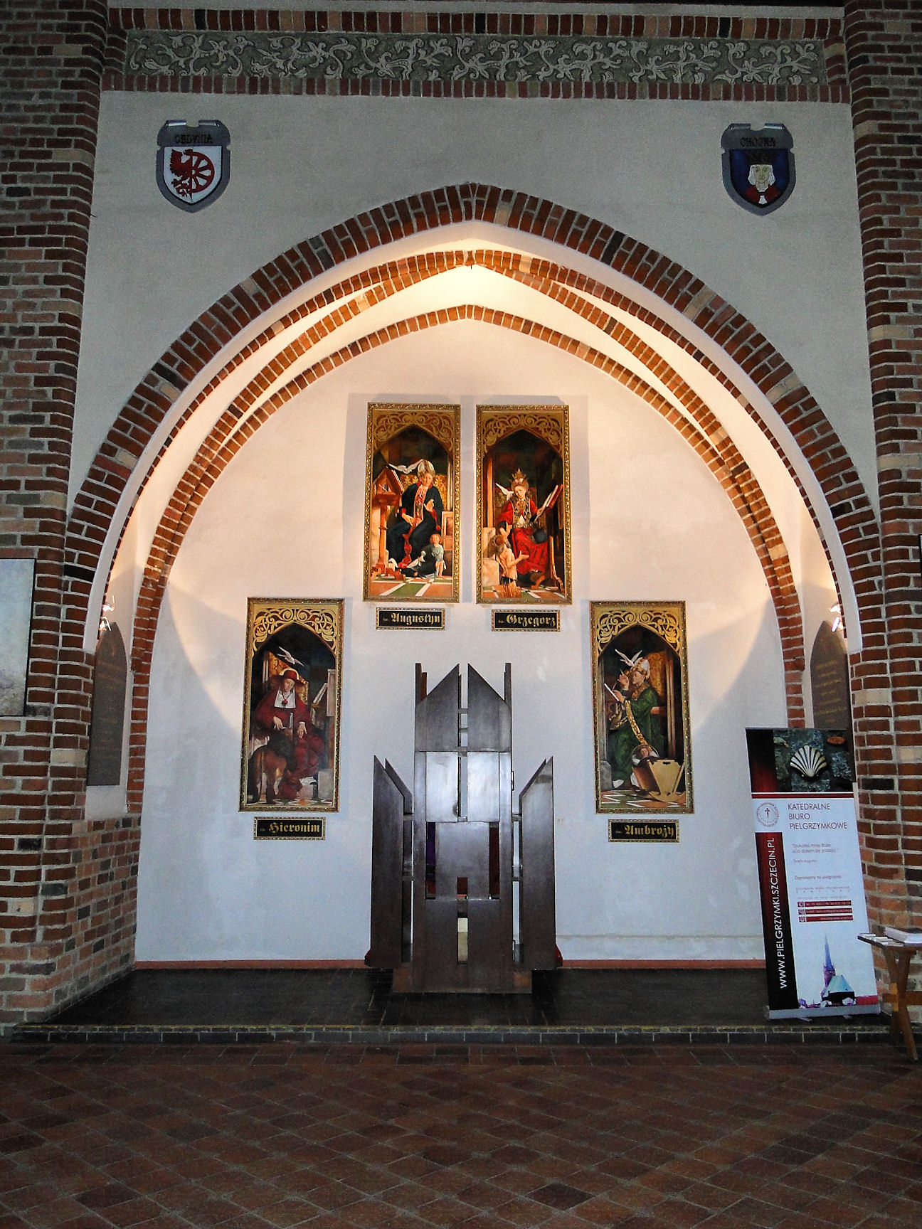 Kaplica akademicka w szczecińskiej katedrze św. Jakuba